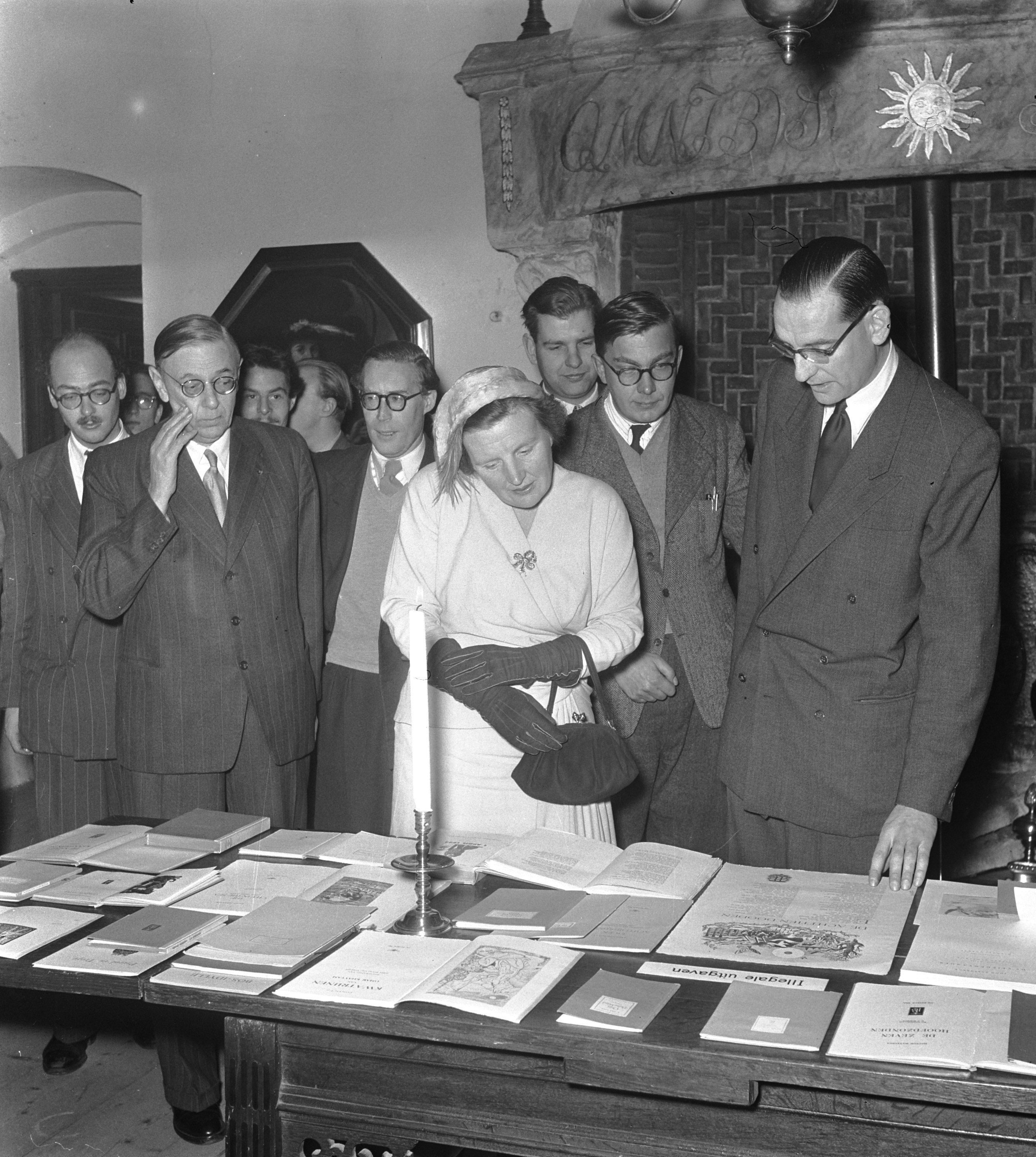 Collectie / Archief : Fotocollectie Anefo Reportage / Serie : [ onbekend ] Beschrijving : H. M. bezoekt tentoonstelling "Bezige Bij" Muiderslot Datum : 25 november 1952 Trefwoorden : tentoonstellingen Persoonsnaam : Bezige Bij Instellingsnaam : Muiderslot Fotograaf : Noske, J.D. / Anefo Auteursrechthebbende : Nationaal Archief Materiaalsoort : Negatief (zwart/wit) Nummer archiefinventaris : bekijk toegang 2.24.01.03 Bestanddeelnummer : 905-4319 Reacties Geplaatst door Literatuurliefhebber op 18 augustus 2016 - 19:17. Koningin Juliana en links Victor E. van Vriesland Plaats: Muiden, Noord-Holland Geplaatst door Literatuurliefhebber op 18 augustus 2016 - 19:19. NB. De expositie (tentoonstelling) vond plaats ter gelegenheid van het 10 jarig bestaan van uitgeverij "De Bezige Bij".